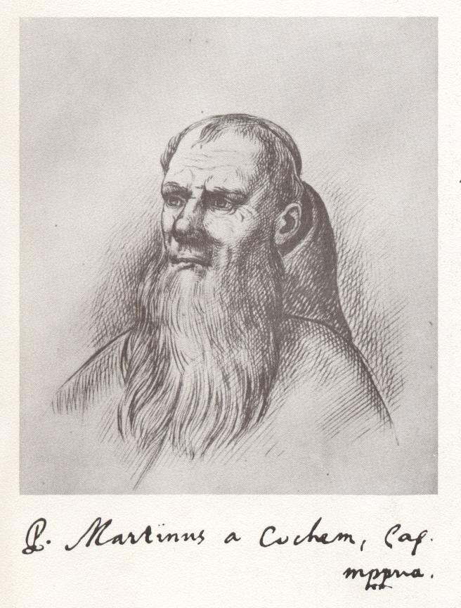 Martin von Cochem, Kaupuziner und Schriftsteller (1634-1712)